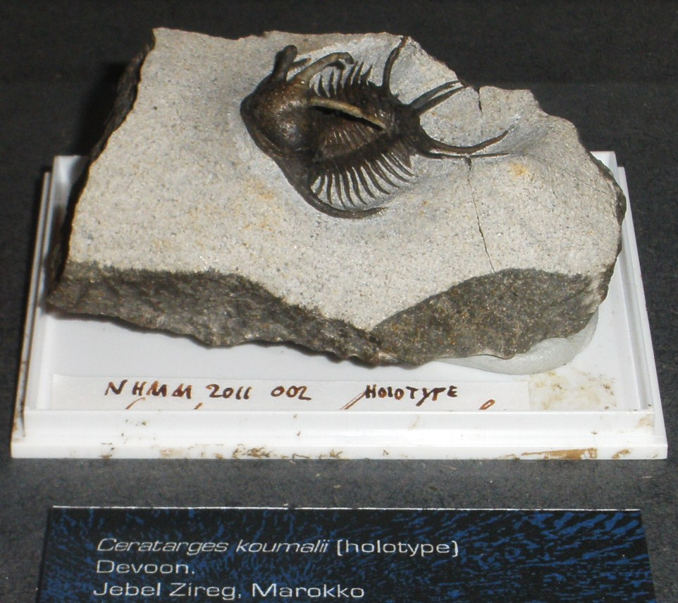 Fossil of Ceratarges, an extinct trilobite- Took the photo at Natural History Museum of Maastricht